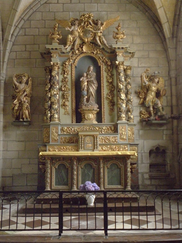 Autel et retable de Notre-Dame du Mont-Carmel en la cathédrale Saint-Paul-Aurélien de Saint-Pol-de-Léon (29).